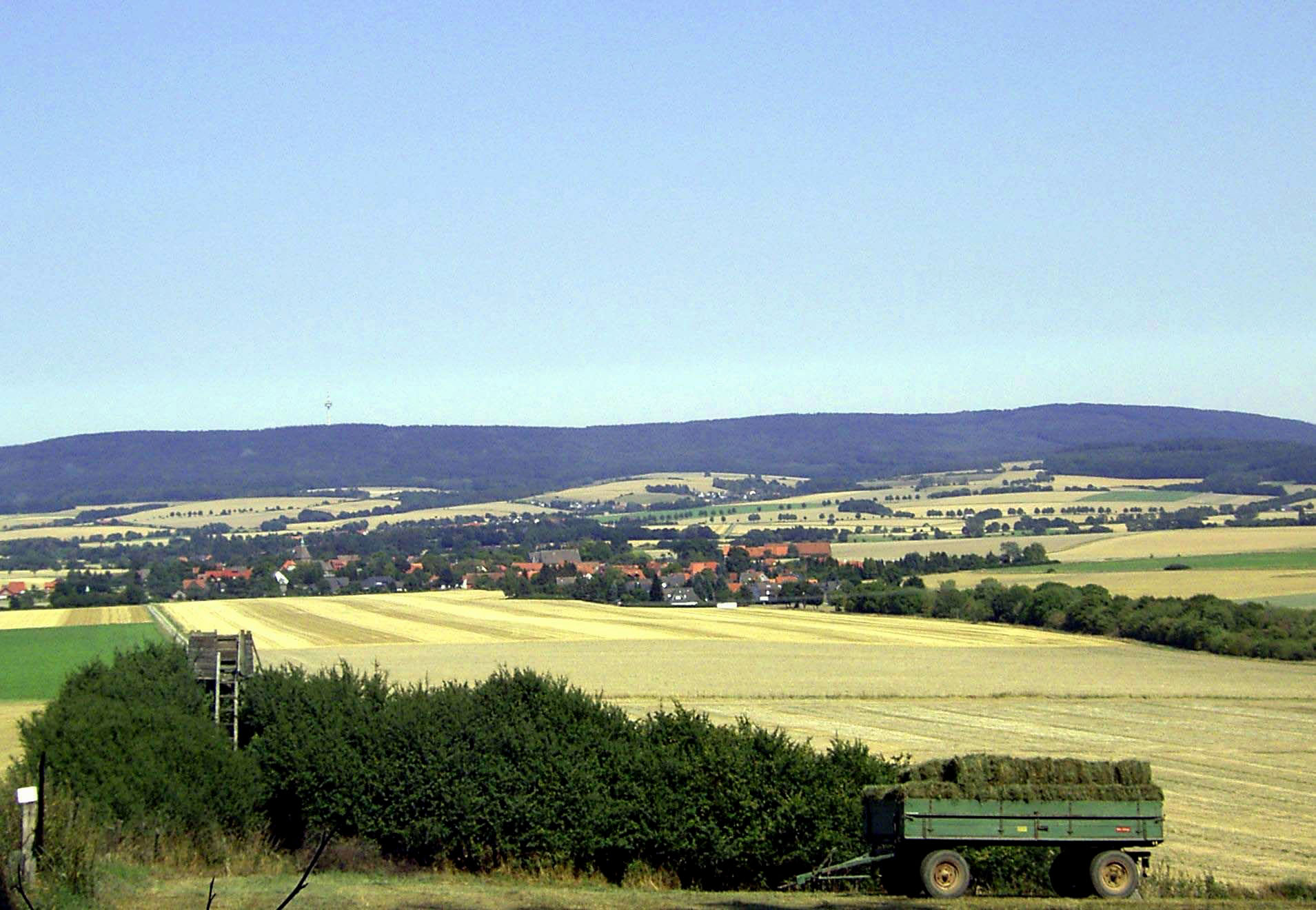 Hülsede im Deister-Sünteltal Das Dorf Hülsede im Deister-Sünteltal vom Hülseder Kriegerdenkmal auf der Westeregge im Süntel aus gesehen. In der linken Bildhälfte zeigt sich der Turm der 1440 erbauten Pfarrkirche St. Ägidien in Hülsede. Hinter Hülsede liegen die kleinen Orte Messenkamp und Altenhagen II am Deisterrand. In der Umgebung sind einige bepflanzte Bachläufe zu sehen, rechts im Bild der „Hülseder Bach“. Im Hintergrund liegt der Deister mit dem Fernmeldeturm auf der 361 m hohen Kuppe „Großer Hals“. Der 1969 errichtete 150 m hohe Turm dient als Richtfunk- und Relais-Station der Deutschen Post.